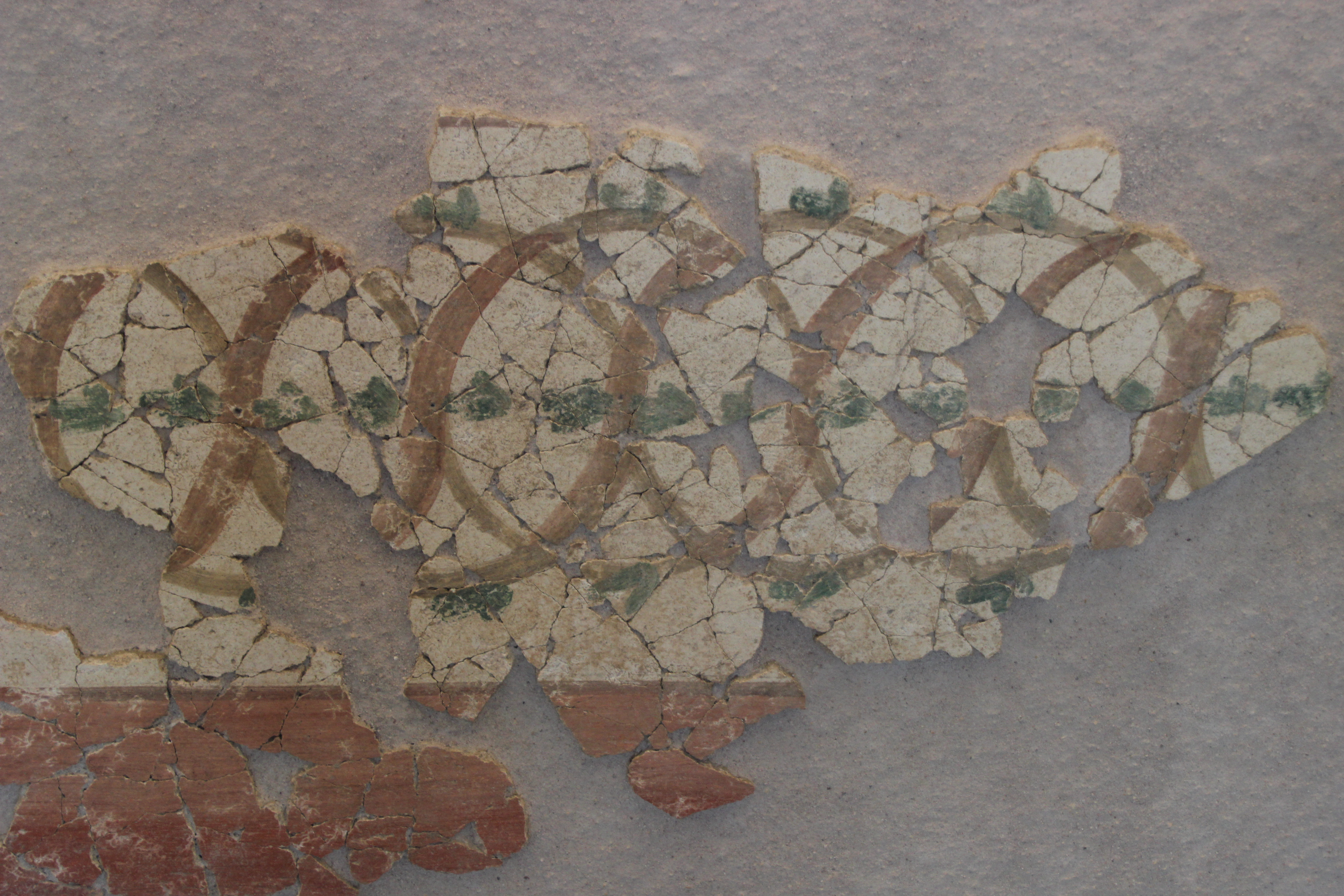 Fresque à cercles de la maison au grand péristyle de Vieux -détail